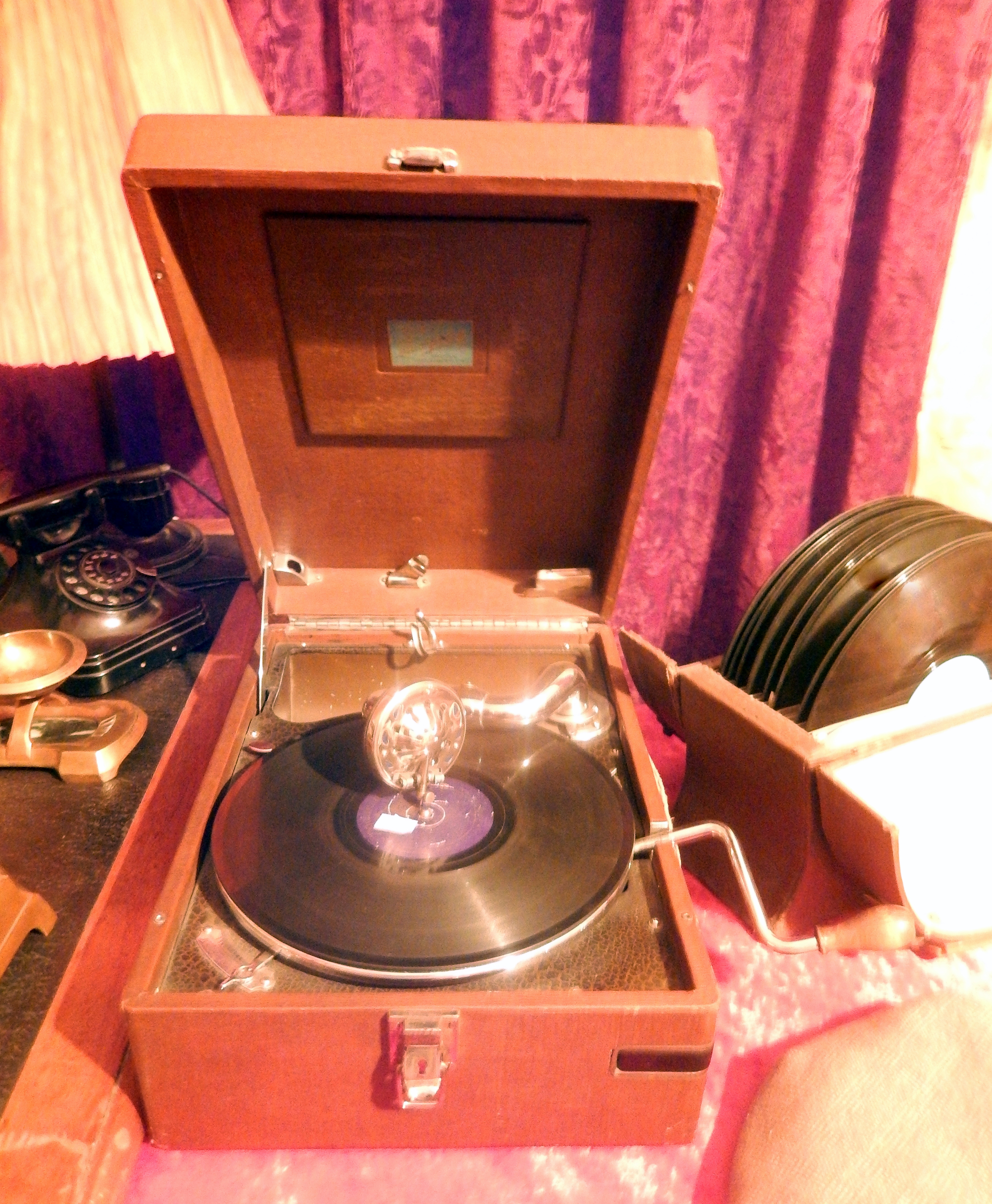 Yeghishe Charents' gramophone at House-Museum of Yeghishe Charents 6/174